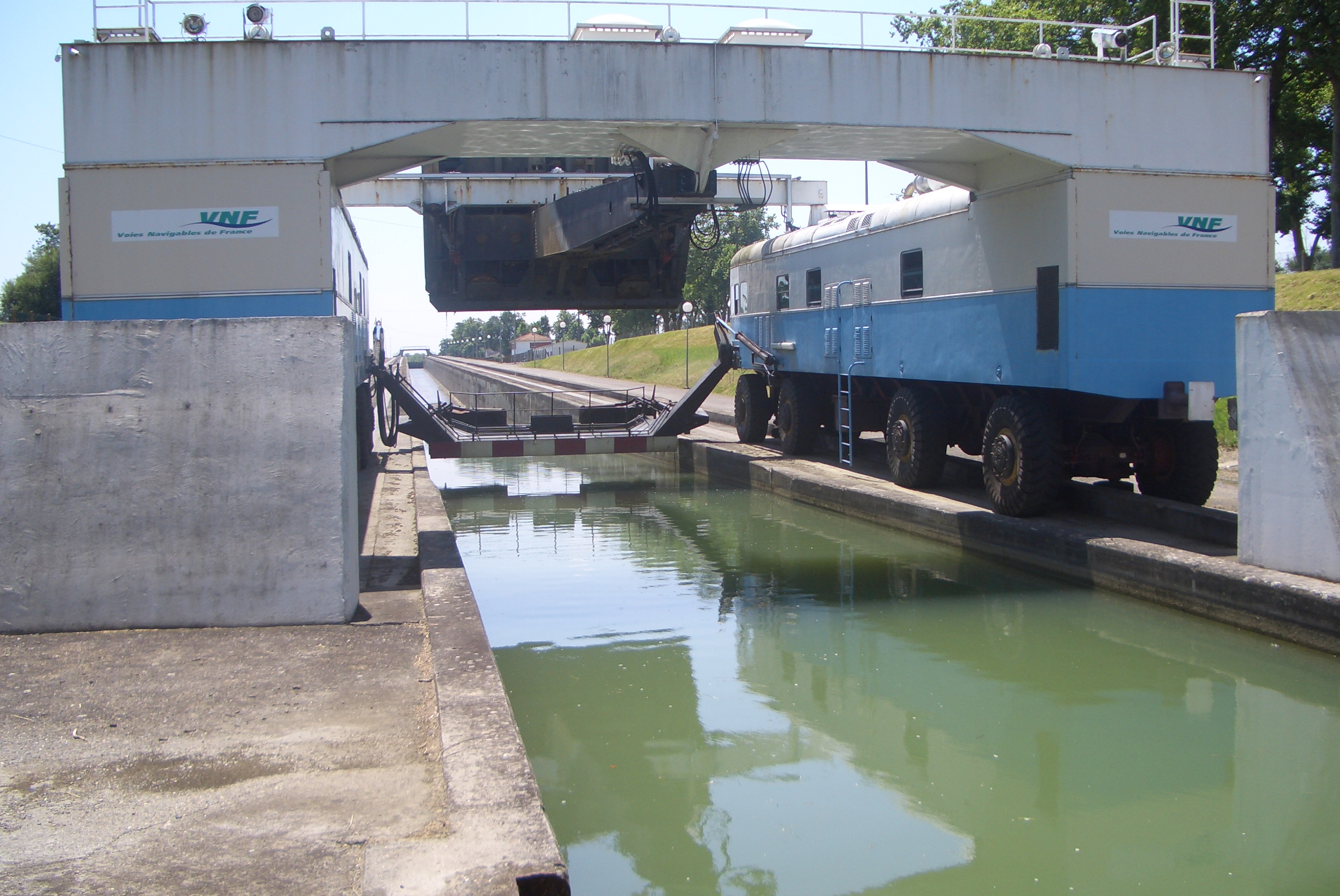 Wasserkeilhebewerk von Montech im Garonne-Seitenkanal. Blick von der talwärtigen Seite